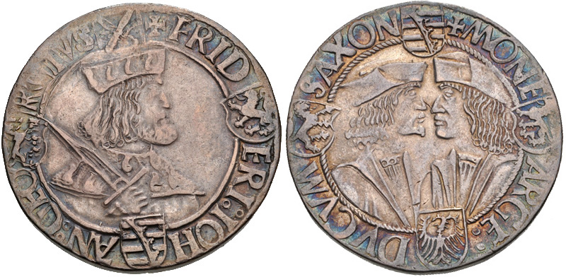 GERMANY, Sachsen-Ernestinische Linie (Kurfürstentum). Friedrich III der Weise (the Wise), with Johann & Georg. 1483-1525. AR Klappmützentaler (39mm, 29.06 g, 9h). Annaberg mint. Struck 1507-1525. Mantled bust of Friedrich right, holding sword / Confronted mantled busts of Johann and Georg. Davenport 9709. VF, toned.